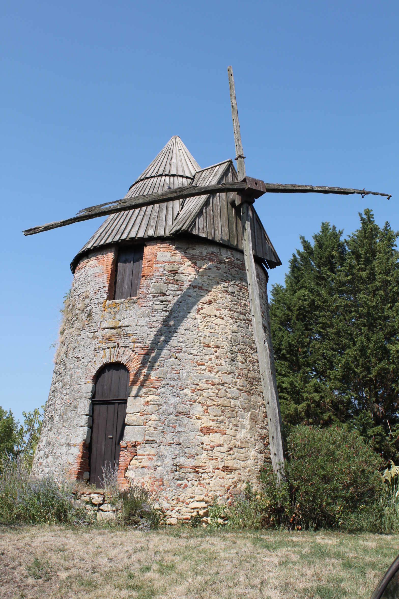 Mascarville (Haute-Garonne, France) - Moulin à vent en Carretou, Le Village (Inscrit, 1992) .